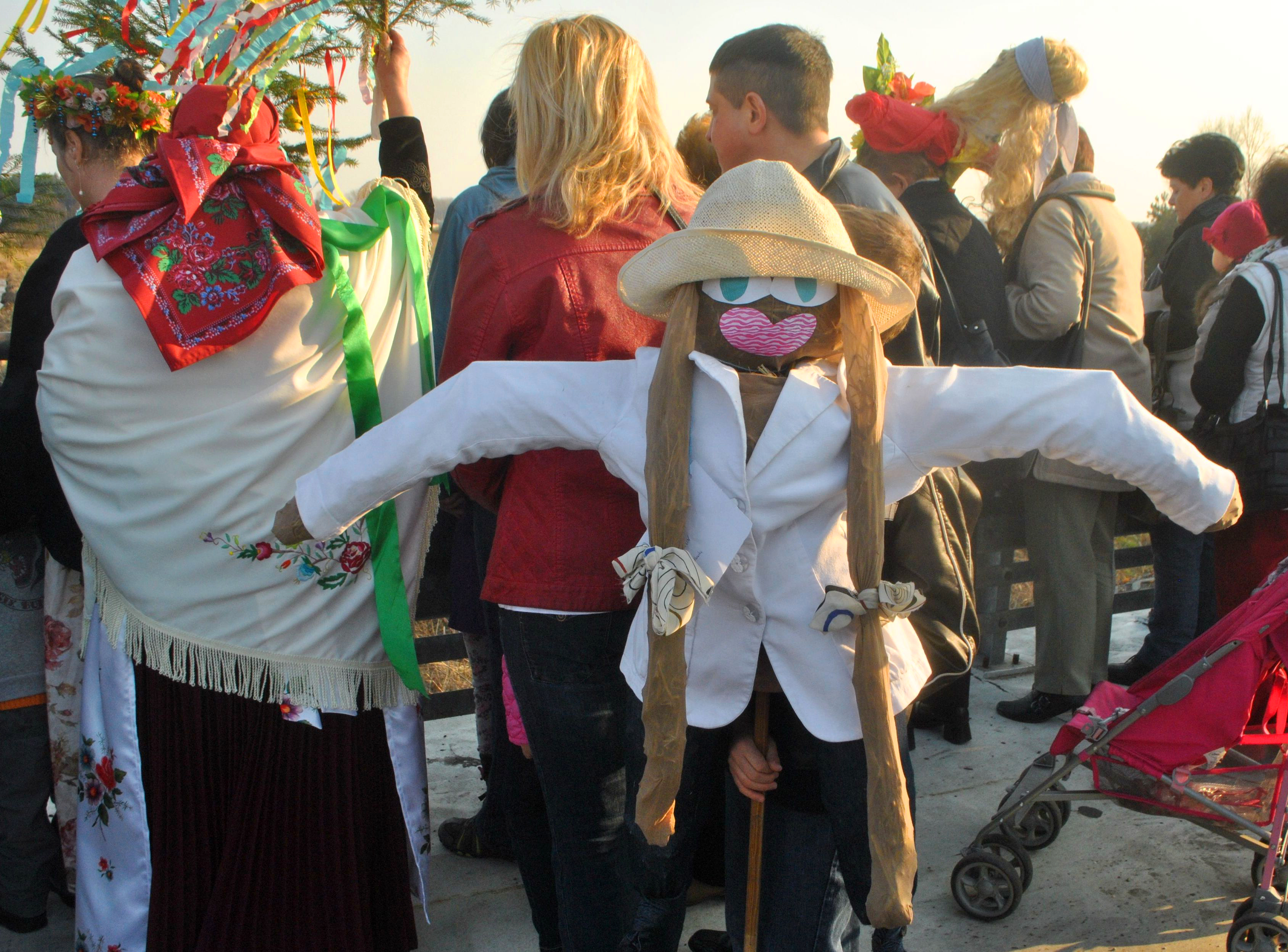 Uroczystość topienia Marzanny i wnoszenia gaika do Miasteczka Sląskiego, 21 marca 2015